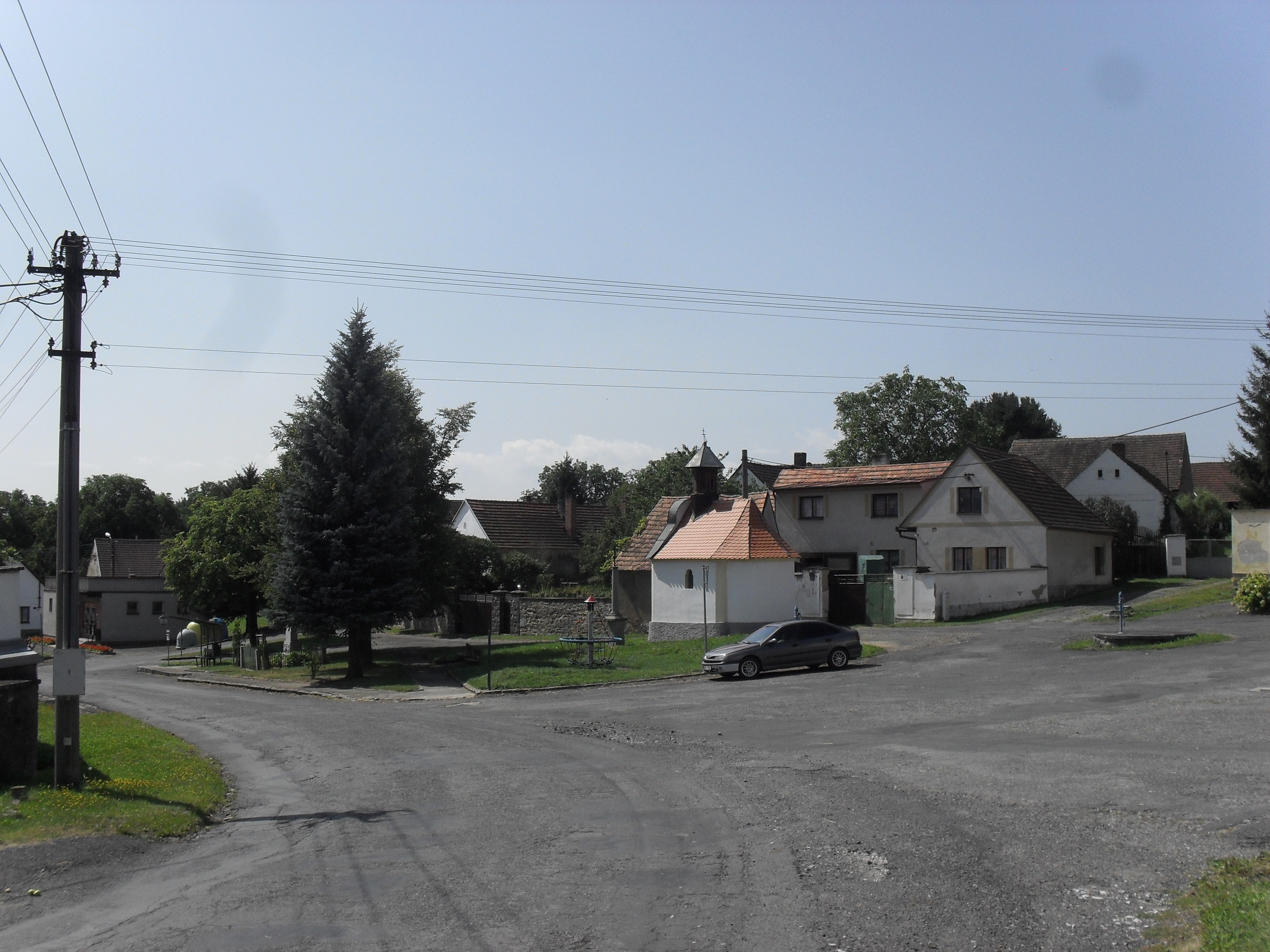 Fotografie pořízena v obci Komušín.